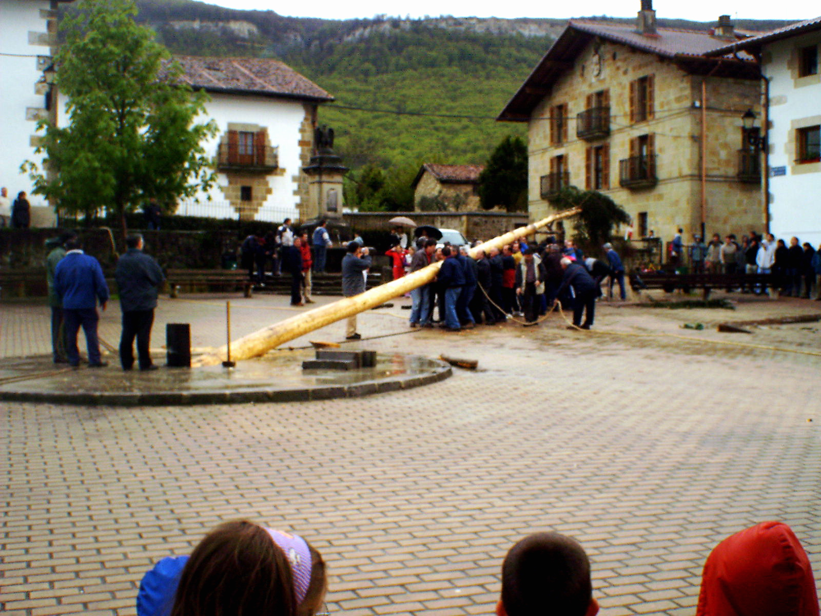 Iturmendi herriko plazan "maiatza" pago-enborra jasotzen.